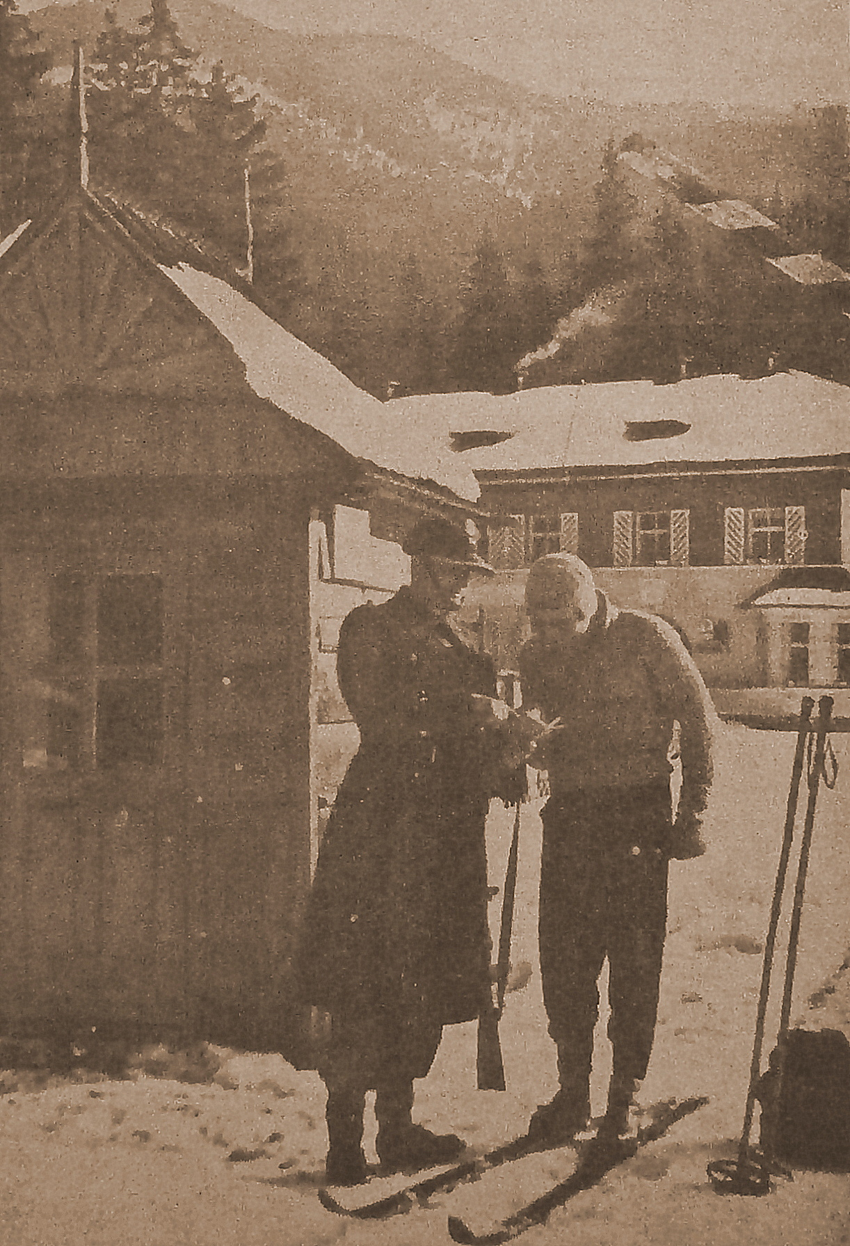 Strażnik Straży Granicznej w 1937. Łysa Polana